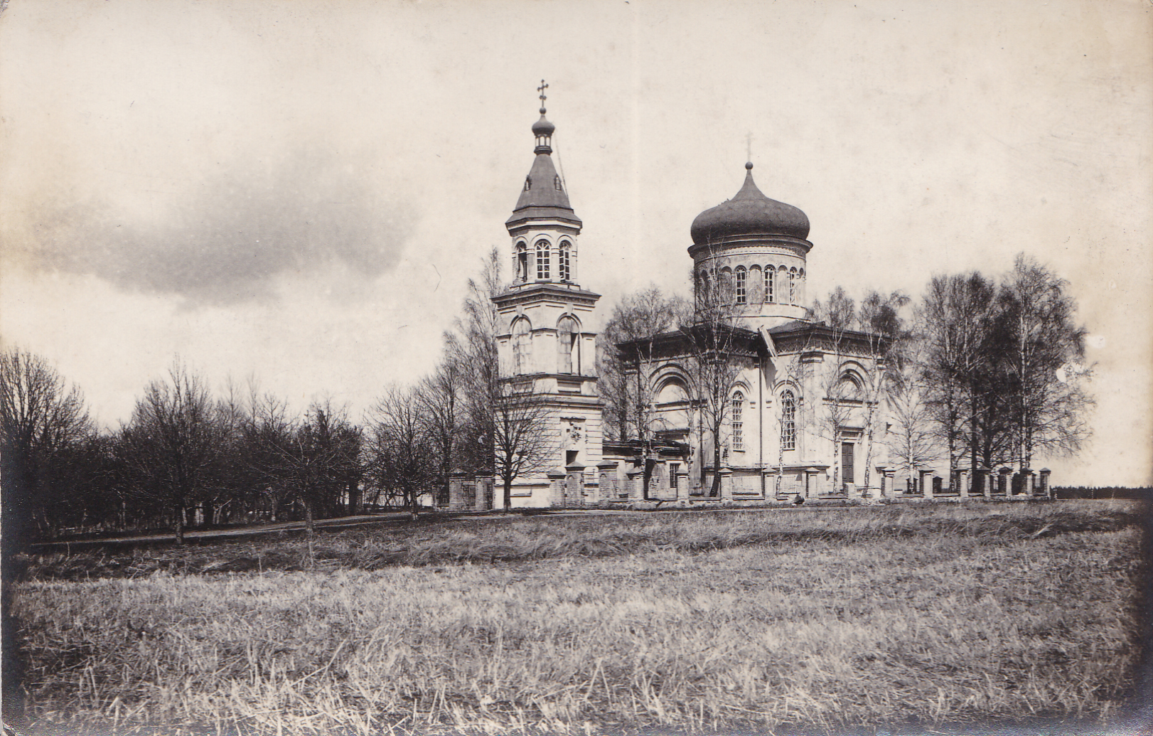 Беларуская (тарашкевіца): Еўе (Jeŭje). Царква Прачыстай Багародзіцы